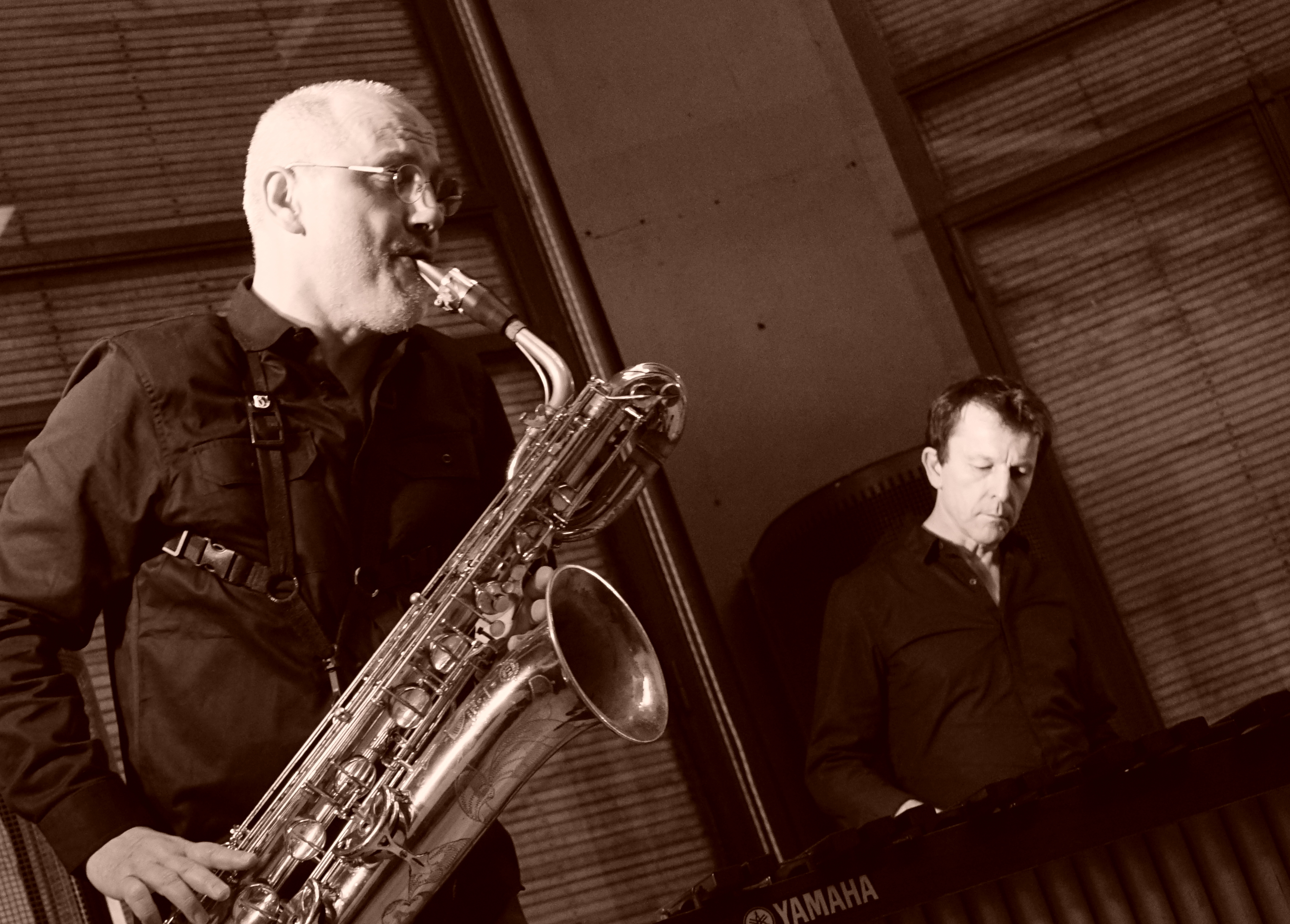 "singing fellows" à la Villa Douce.